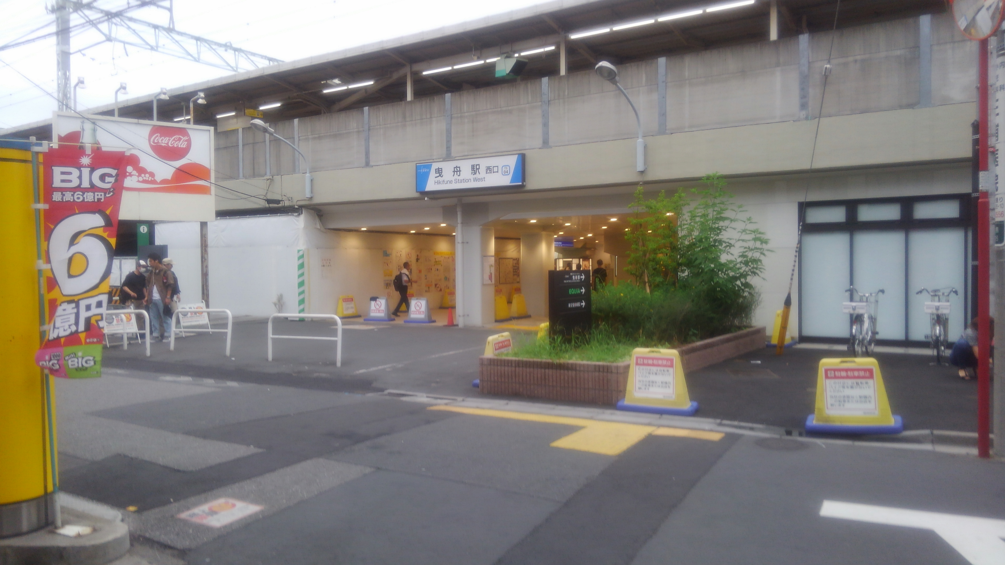 東武曳舟駅西口